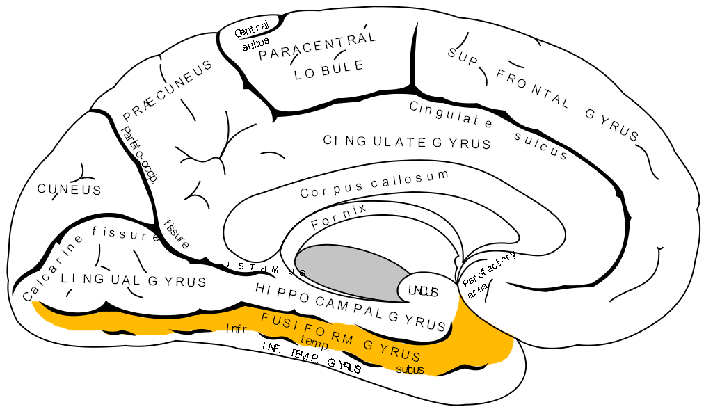 fusiform gyrus (occipito-temporal gyrus).